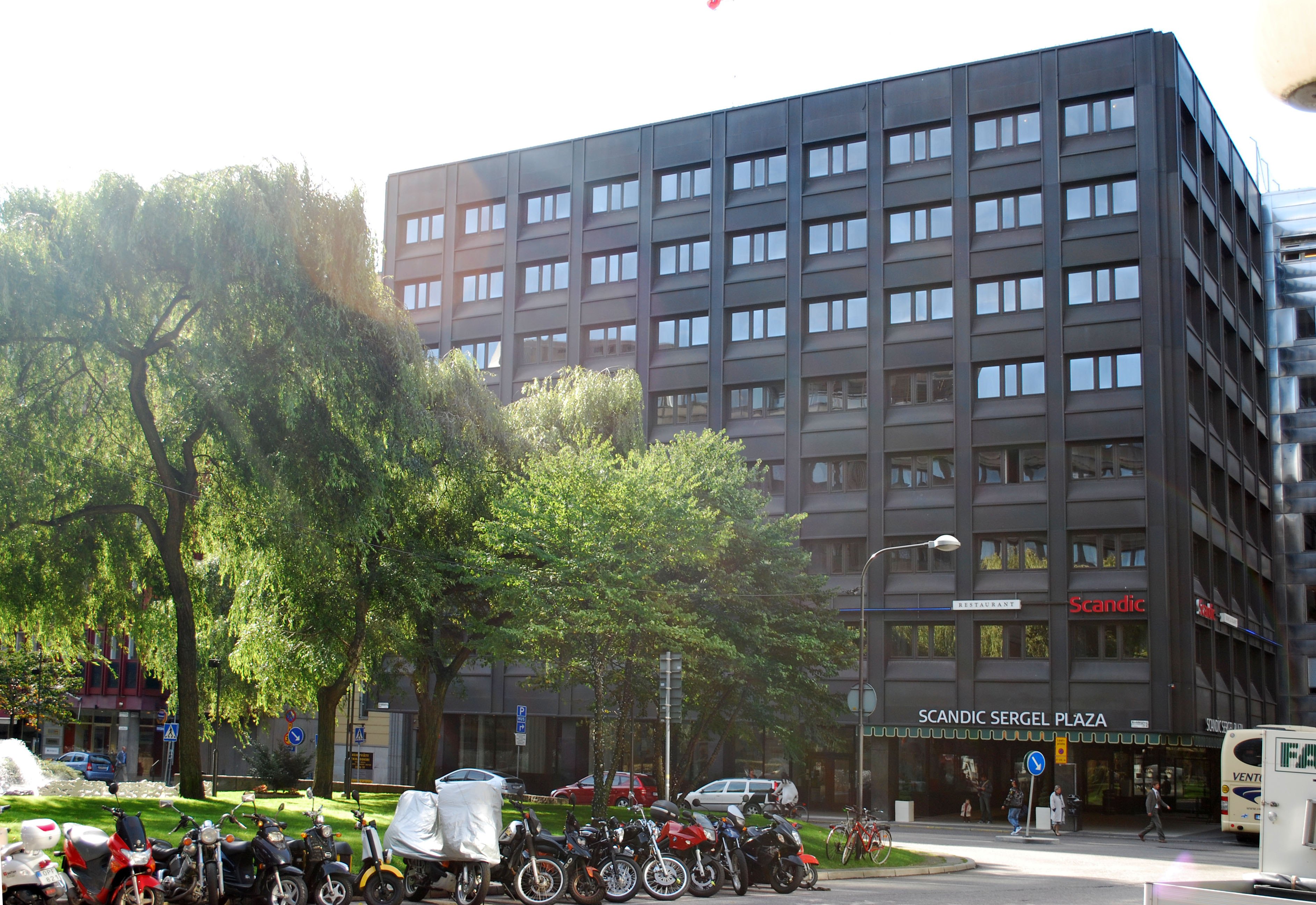 Sergel Plaza, Brunkebergstorg 7-9, SKANSEN 18